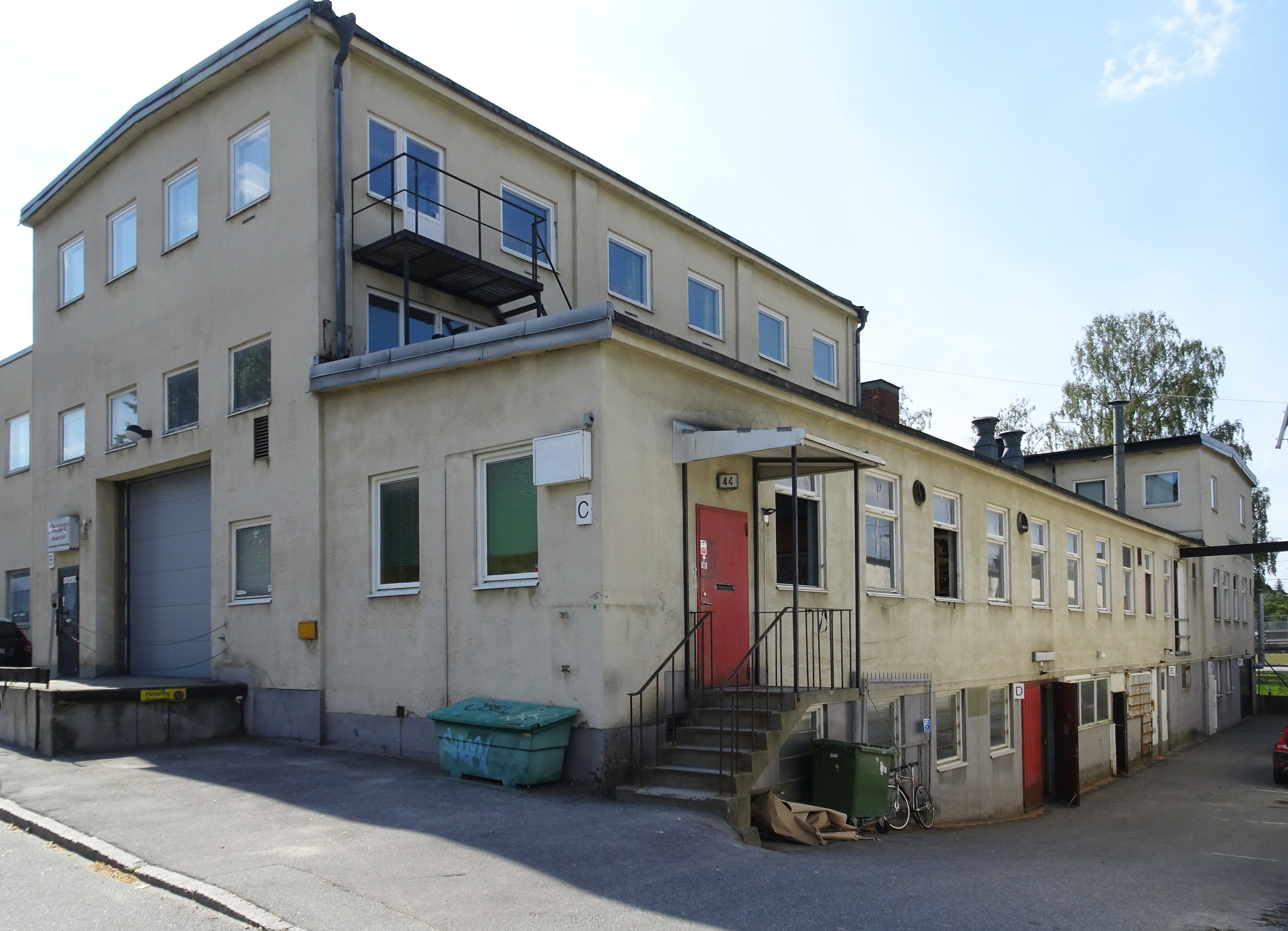 Herman Bergman Konstgjuteri, verkstaden vid Sandsborgsvägen 44 i Enskede, Stockholm, byggår 1949-1950, Bergmans Konstgjuteri AB (Byggherre), Hemming Bergman (Arkitekt), Kaleb Sjödén (Arkitekt), Sven Dahlberg (Byggmästare)